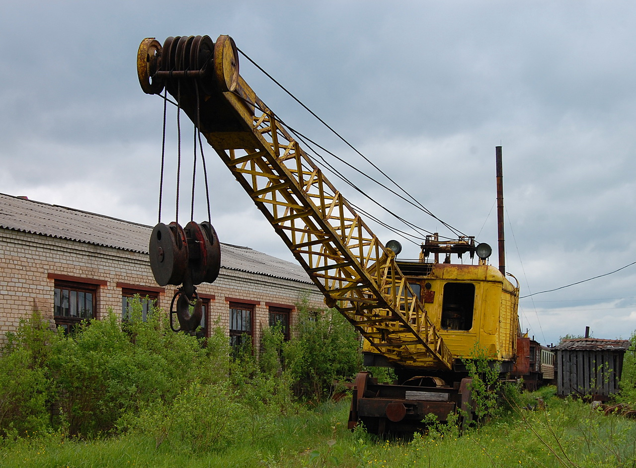 Опаринская УЖД